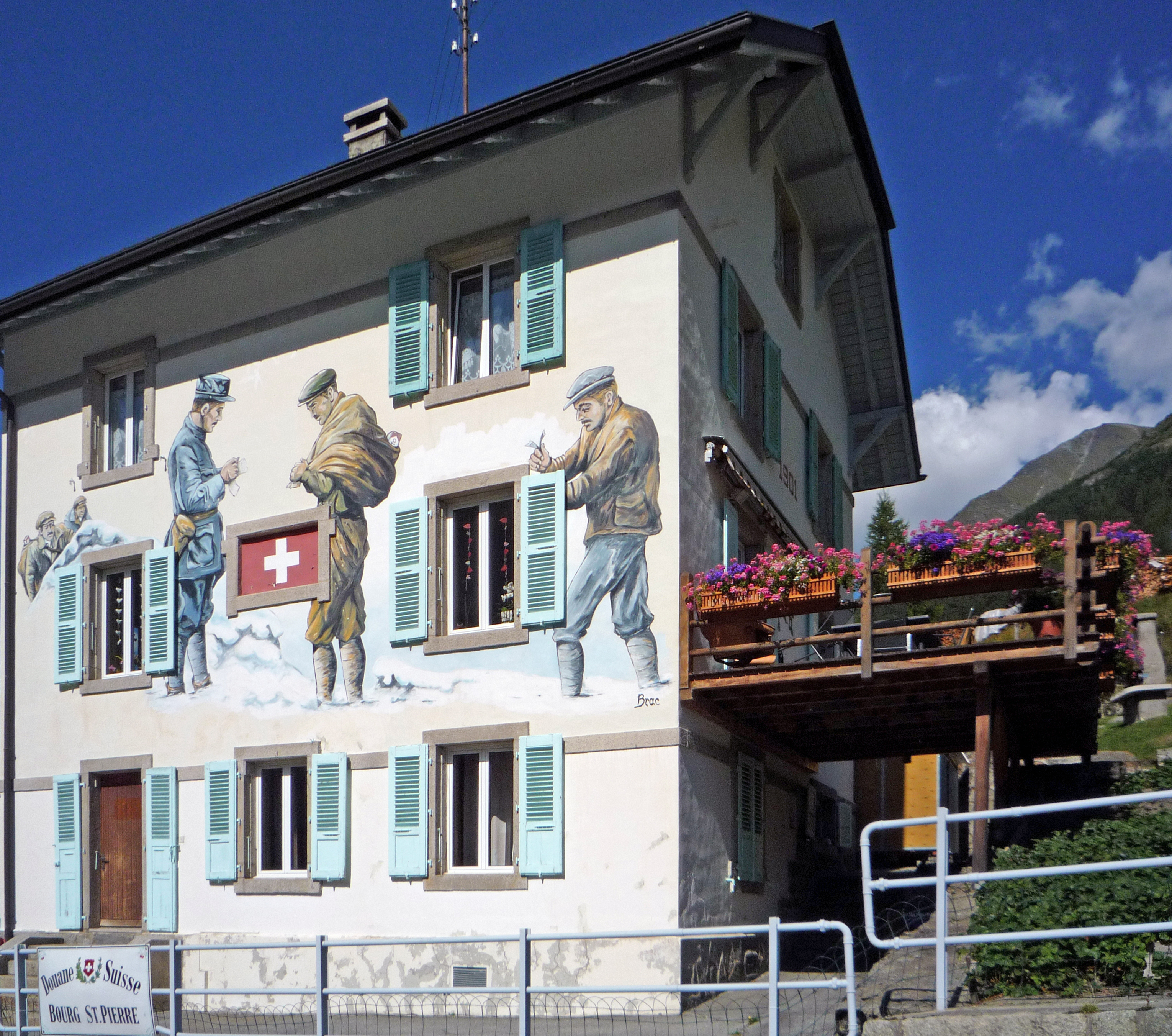 Cette maison était la douane Suisse à Bourg-Saint-Pierre. Sur la façade de l'illustration de contrebande, il y a une signature indiquant Brac. Sur la face du côté droite de la maison se trouve l'inscription 1901 Douane Suisse. On peut distinguer un paquet de cigarette dans un sac, synonyme de contrebande. Deux anciennes images illustrent la maison de la douane entre 1910 et 1930, ci-dessous, du photographe André Kern : André Kern, Médiathèque Valais - Martigny